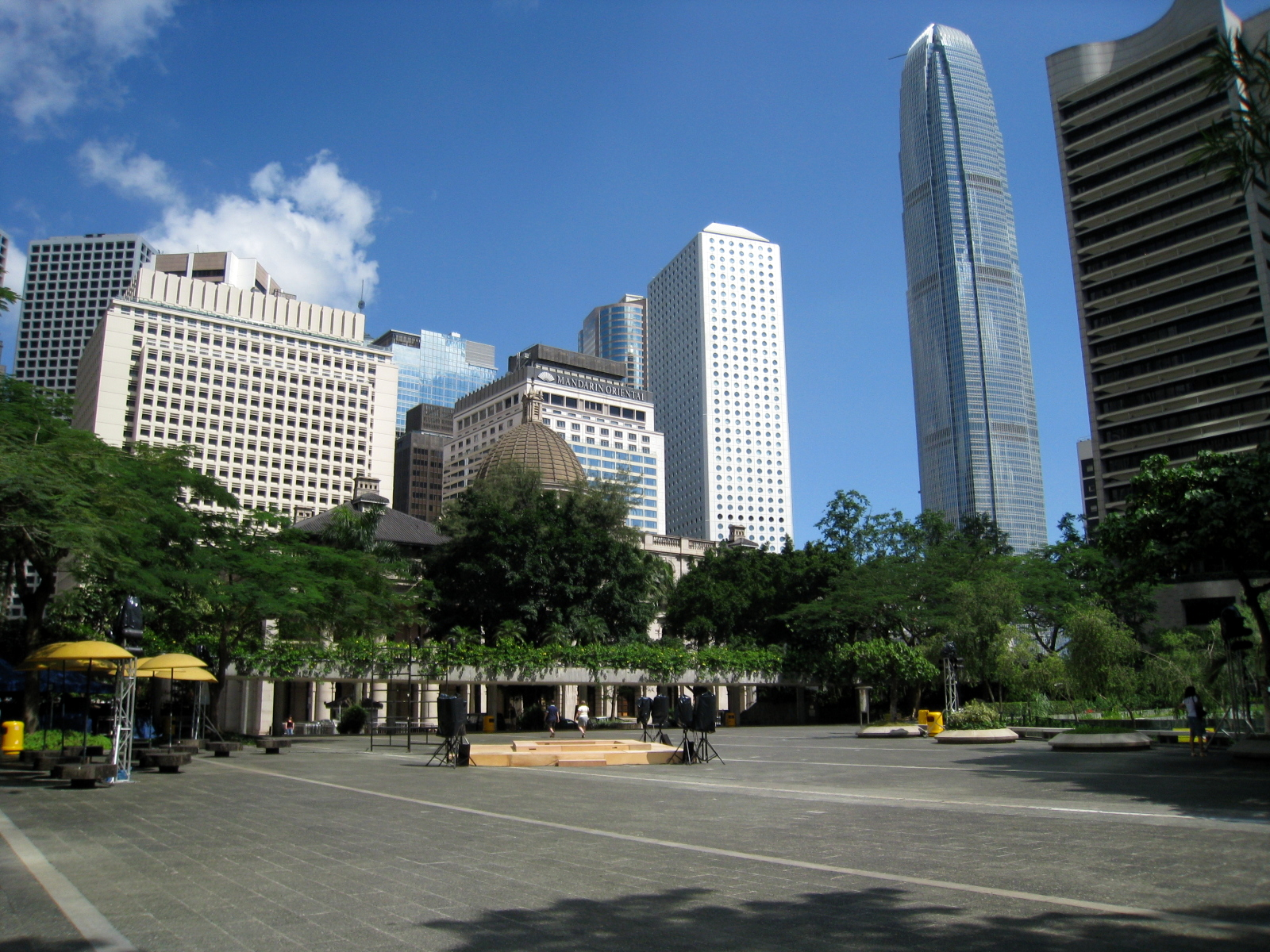 HK Chater Garden Plaza 遮打花園